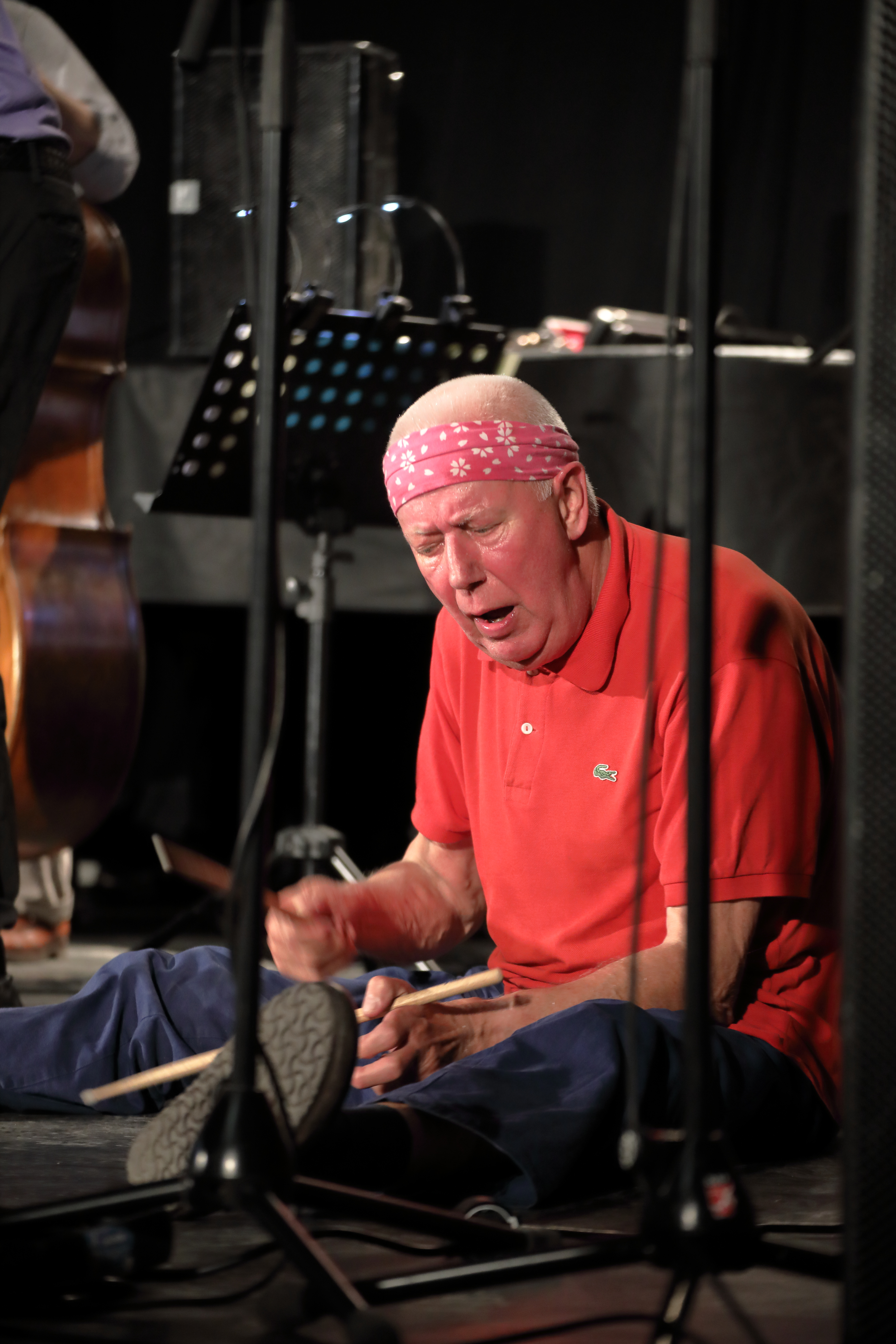 Ray Anderson (tb), Han Bennink (dr), Ernst Glerum (db) und Paul van Kemenade (alto sax) auf dem INNtöne Jazzfestival 2019.